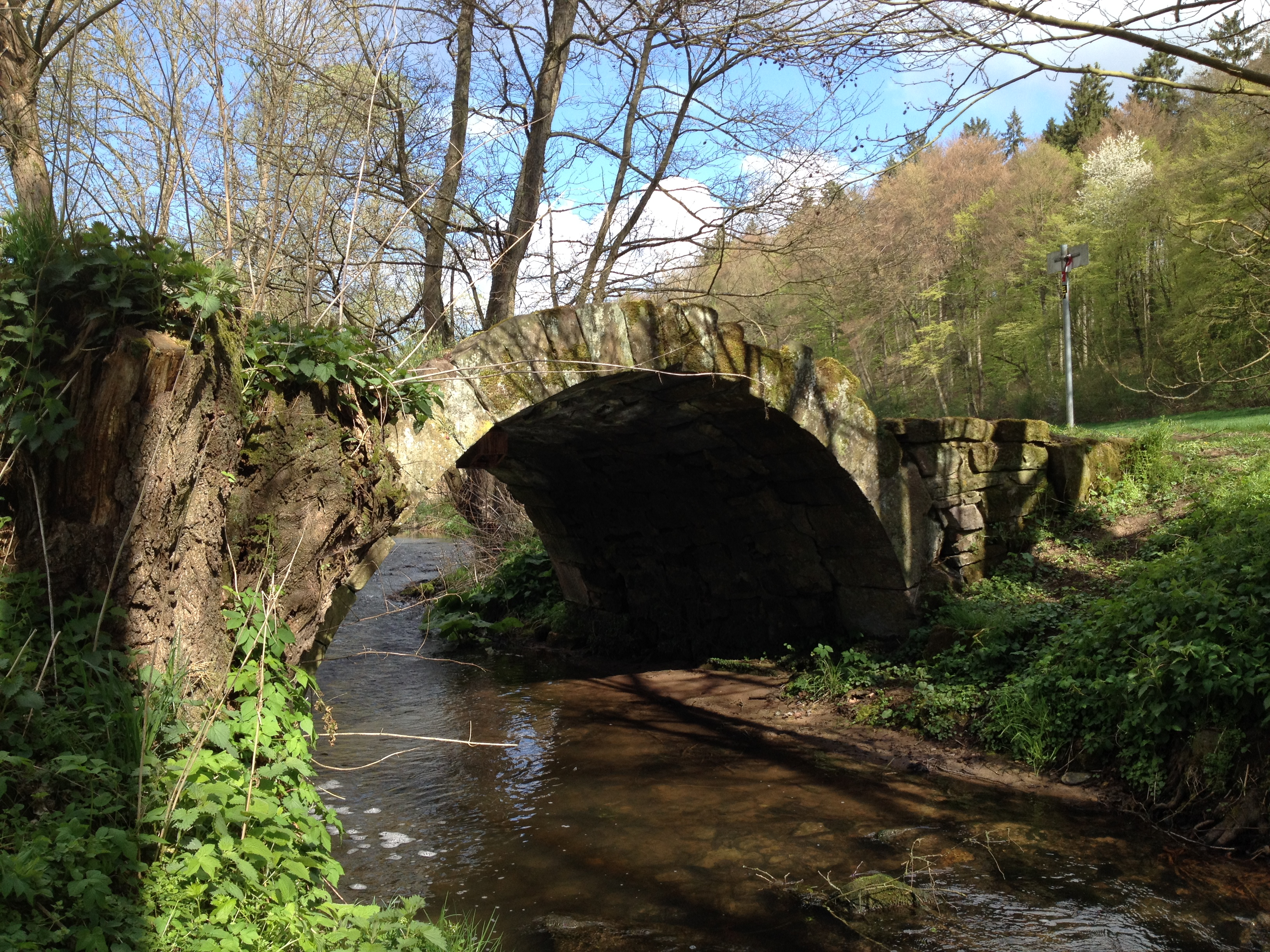 Die Kurfürstenbrücke im Emstal zwischen Merxhausen und der Weißenthalsmühle. Über die Brücke führen der Eco Pfad Friedenspädagogik Bad Emstal, der Rundweg 1 (vom Parkplatz Wiesentahlmühle aus) und der Rundweg E7.